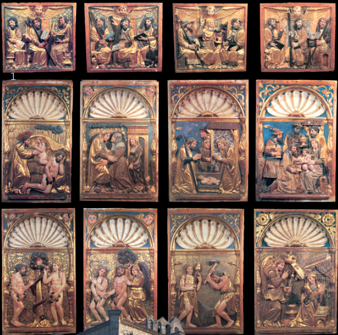 Bidaurretako errataula, Oñati